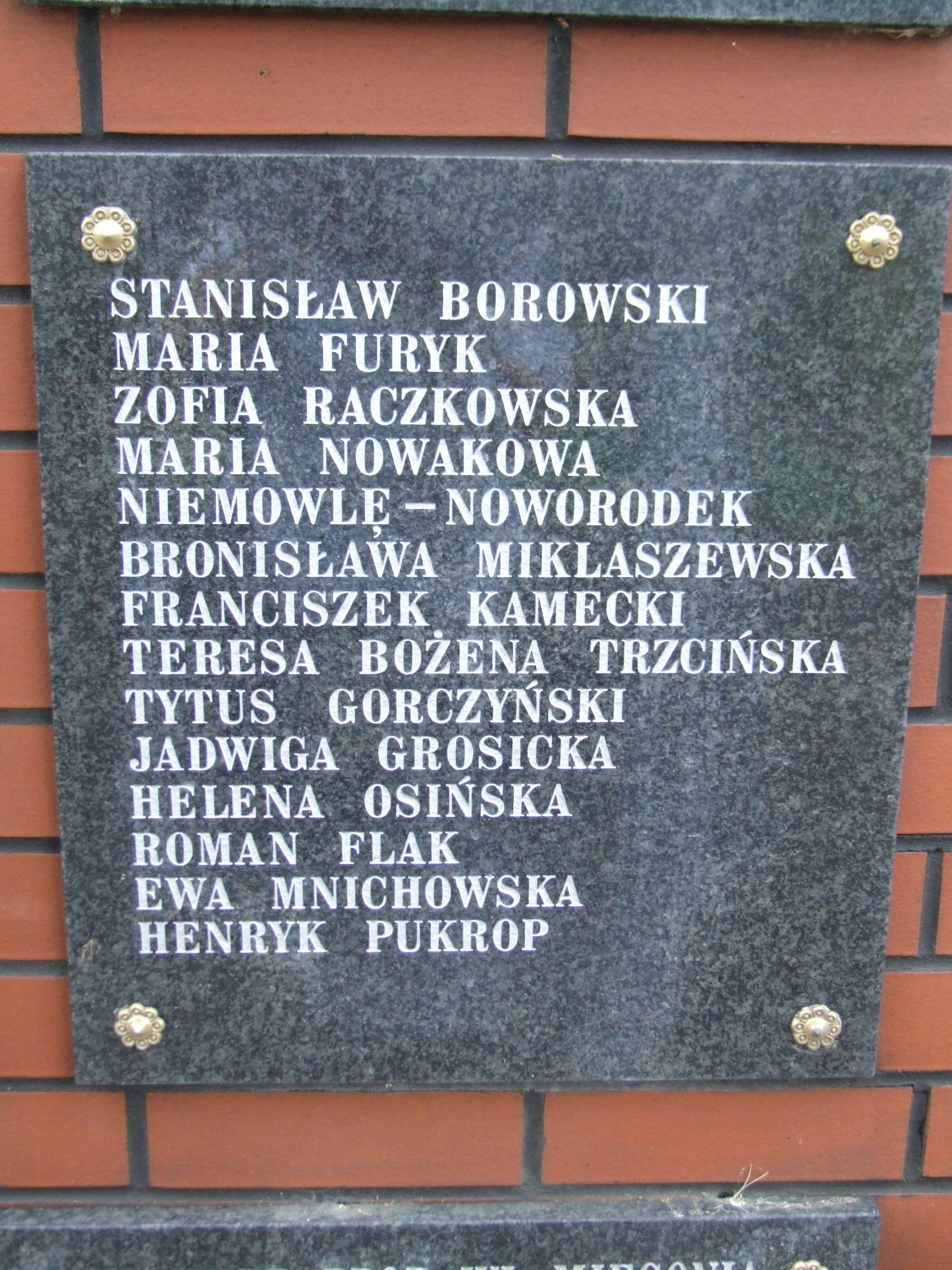 Gdynia-Oksywie Cmentarz Marynarki Wojennej